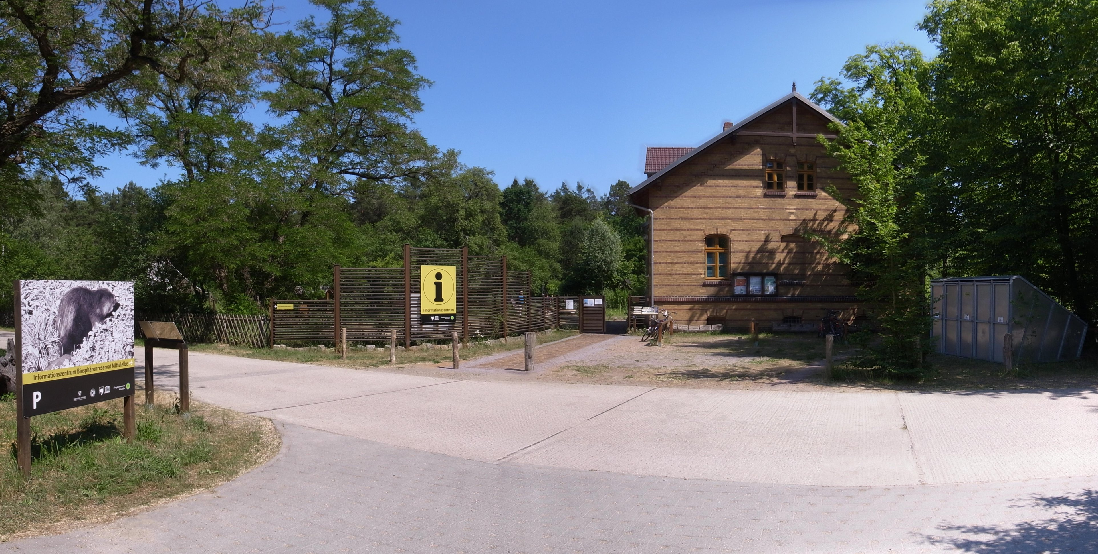 Biosphärenreservat Mittelelbe,Eingang zum Informationszentrum, Alfred-Hinsche-Haus